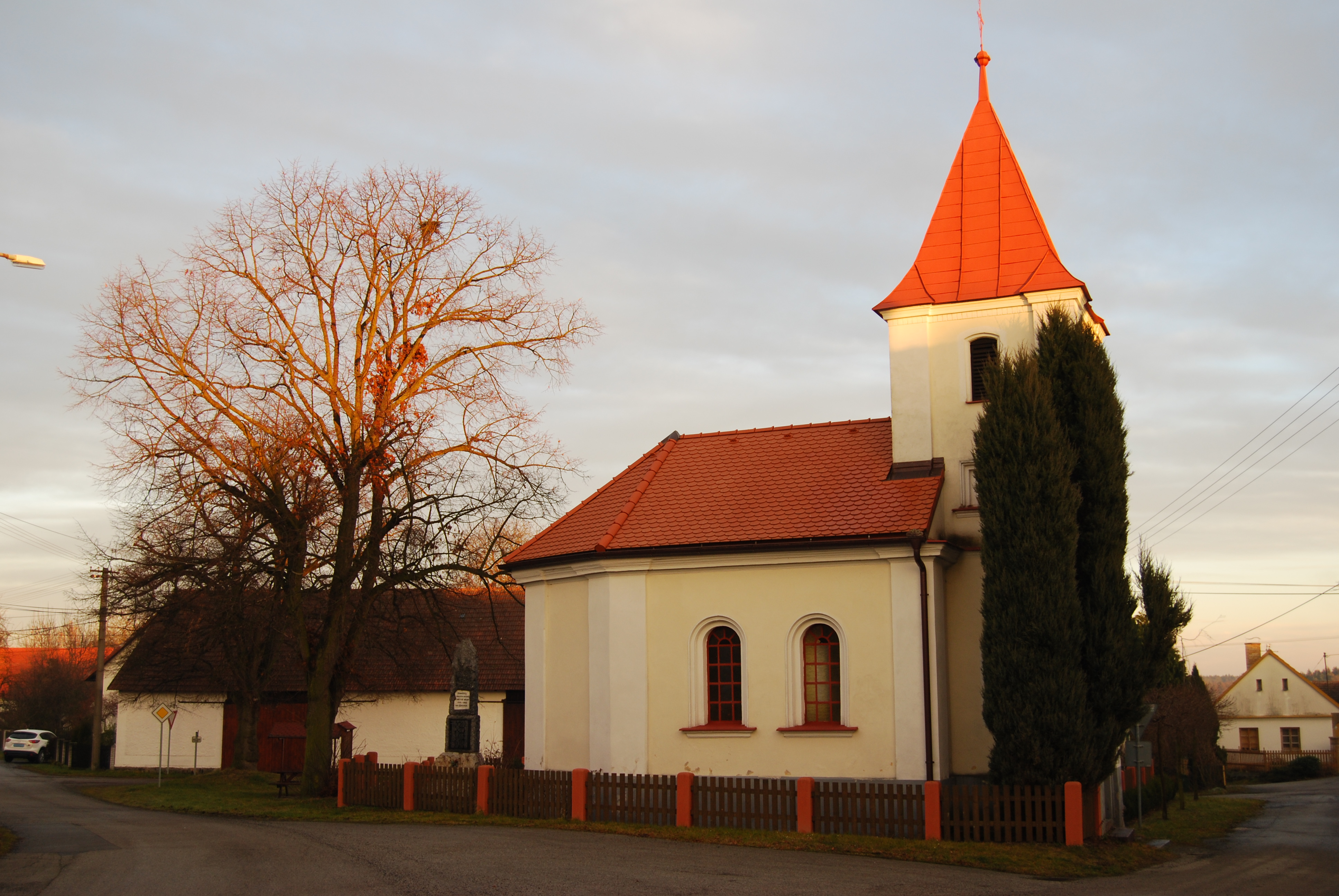 Kaple v obci. Obec Radkov - v okrese Tábor, kraj Jihočeský. Česká republika.